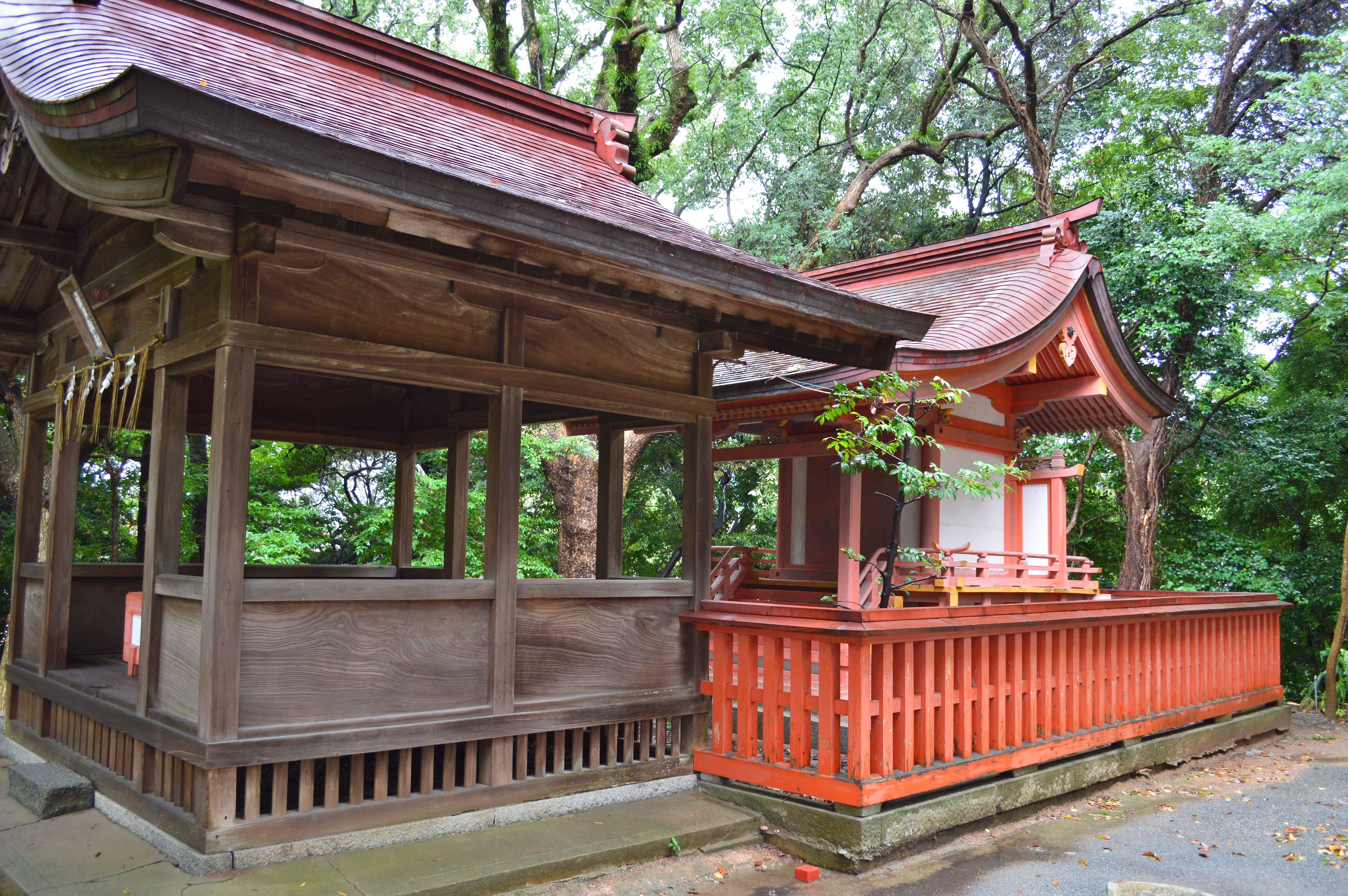 香椎宮 境内武内神社